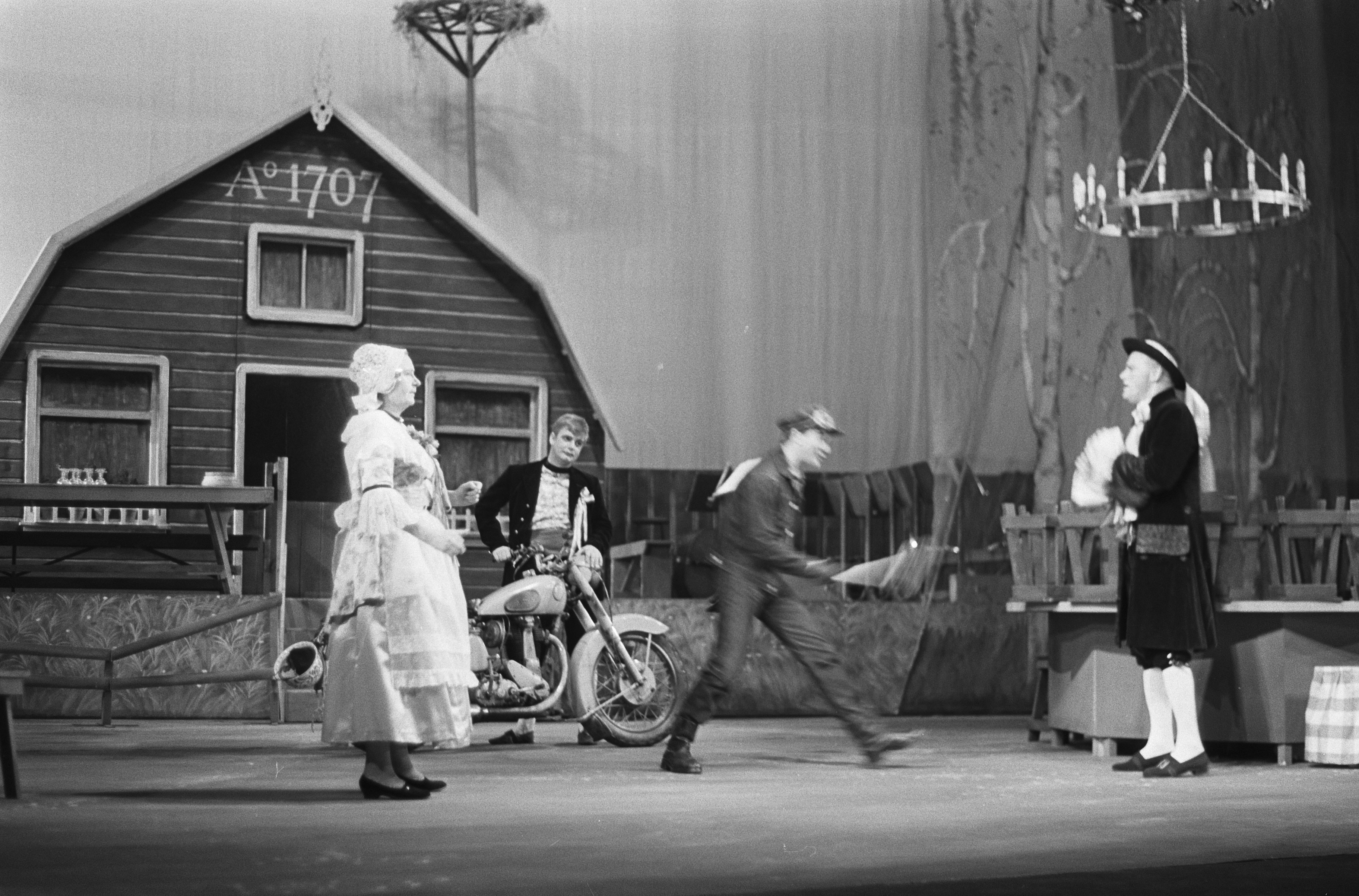 Collectie / Archief : Fotocollectie Anefo Reportage / Serie : [ onbekend ] Beschrijving : Nederlandse comedie, de bruiloft van Kloris en Roosje, de nieuwjaarswens van Thomasvaer en Pieternel in Stadsschouwburg Datum : 30 december 1964 Trefwoorden : acteurs, actrices, toneel, toneelspelers Instellingsnaam : Nederlandse Comedie Fotograaf : Gelderen, Hugo van / Anefo Auteursrechthebbende : Nationaal Archief Materiaalsoort : Negatief (zwart/wit) Nummer archiefinventaris : bekijk toegang 2.24.01.05 Bestanddeelnummer : 917-2934